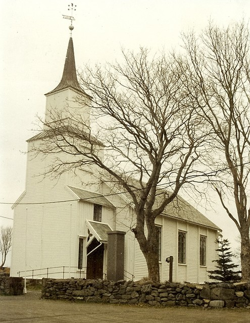 Hustad kirke